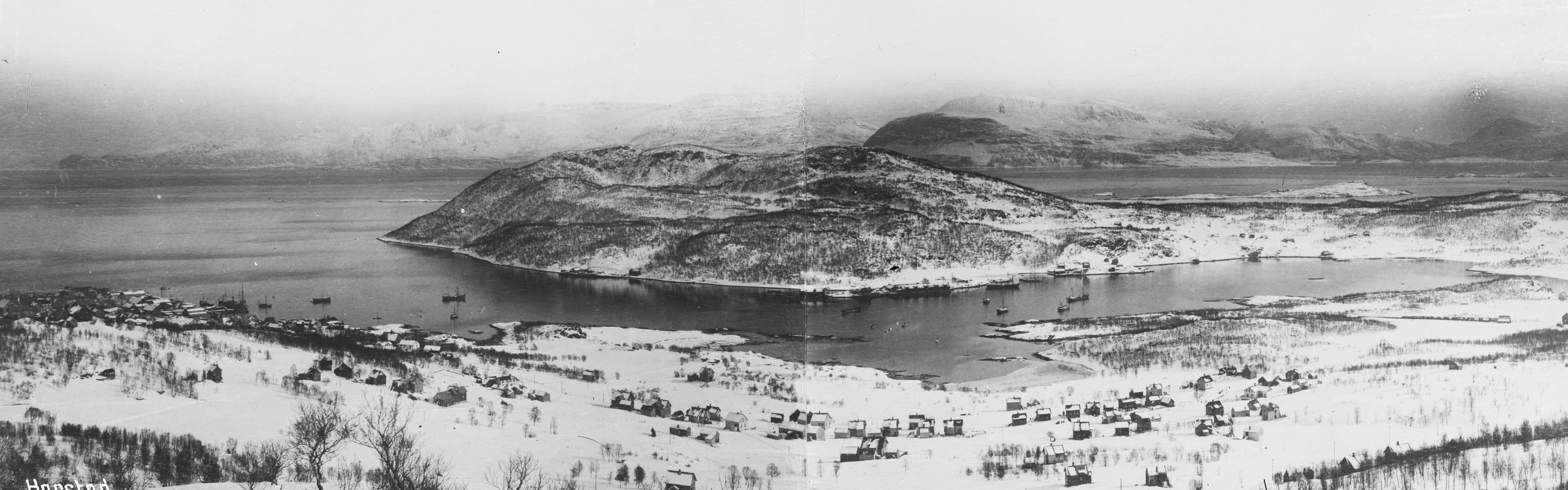 Påskrift negativ: Harstad Påskrift konvolutt: B-432 Harstad. Panorama [Riksantikvaren] Sted: Harstad Kommune: Harstad Fylke: Troms Tagger: repro?: by landskap panorama